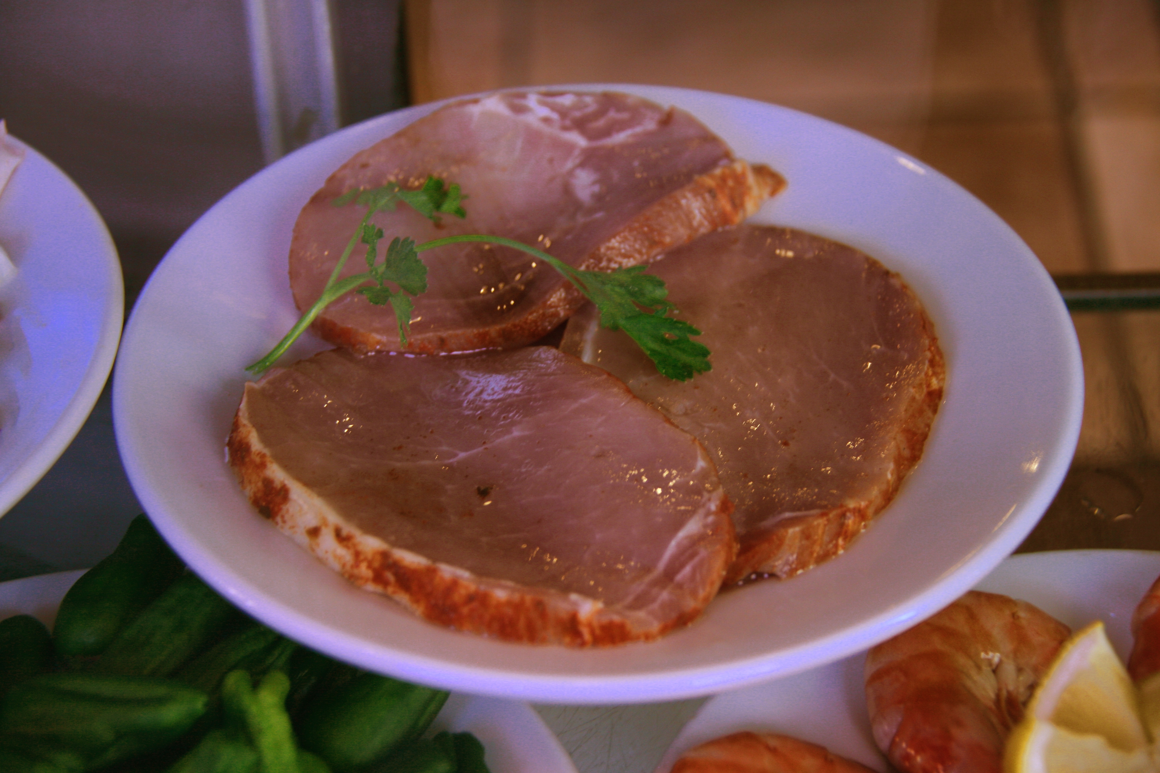 Schweinelende